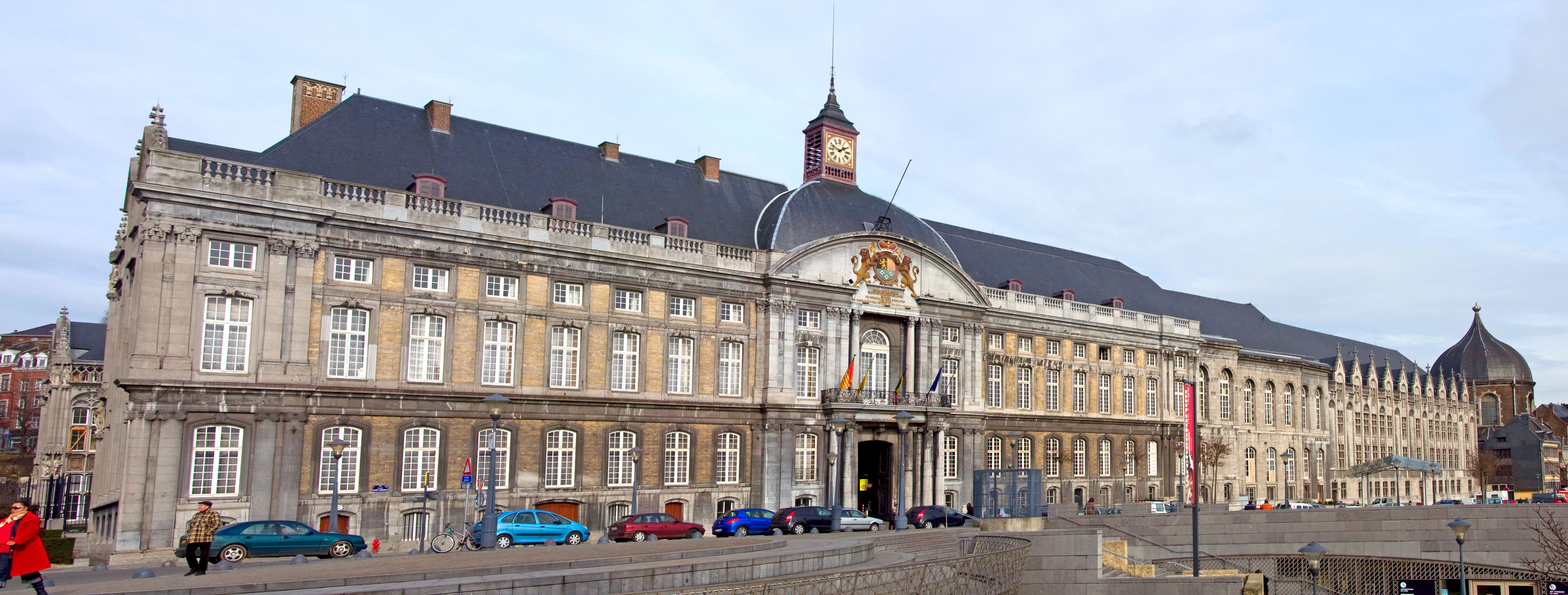 Prinsbisschoppelijk paleis te Luik, België